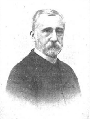 Retrato de Faustino Rodríguez Sampedro por Franzen y recogido en la revista española Nuevo Mundo.